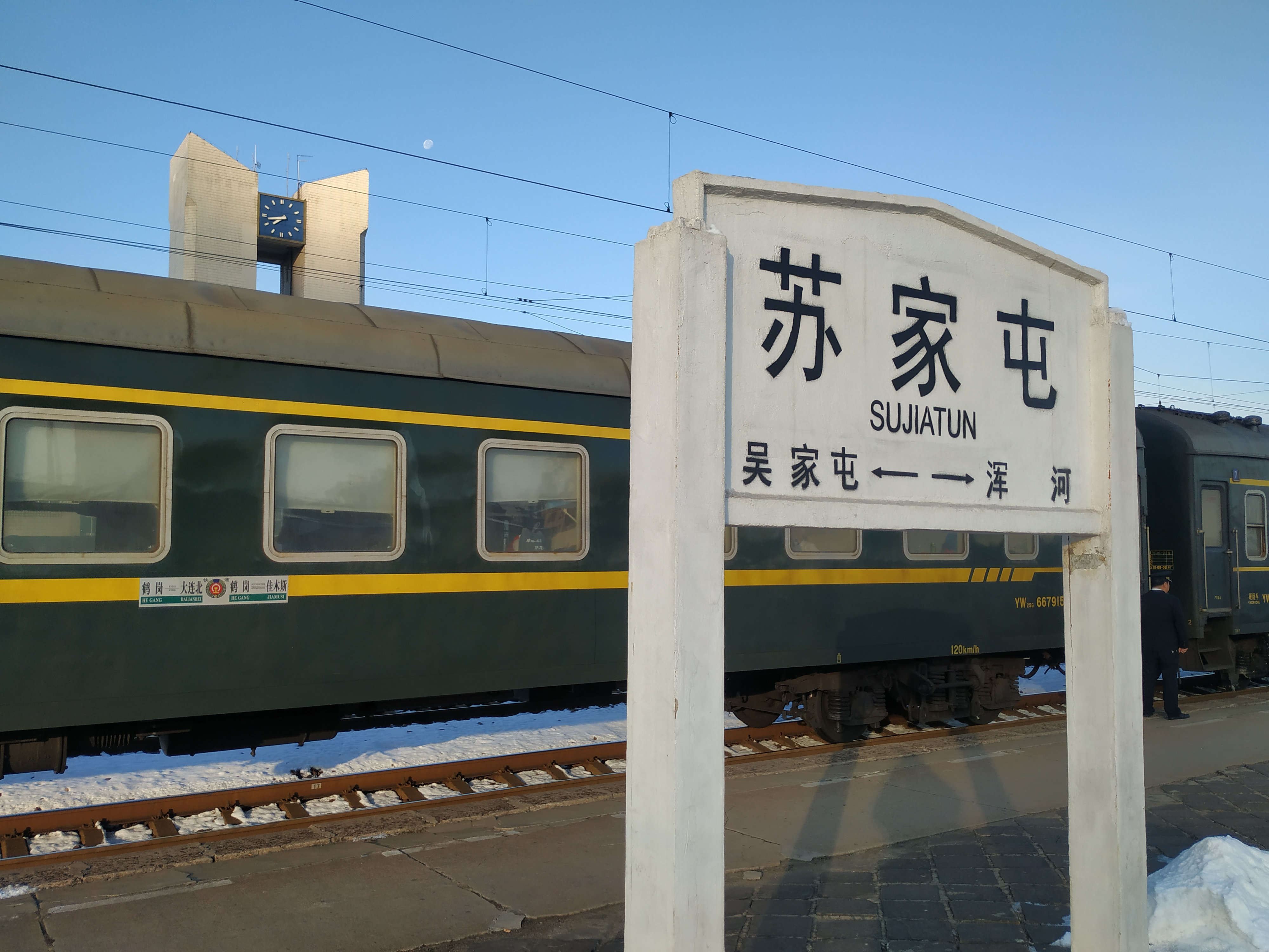 中文（中国大陆）: 苏家屯站站牌